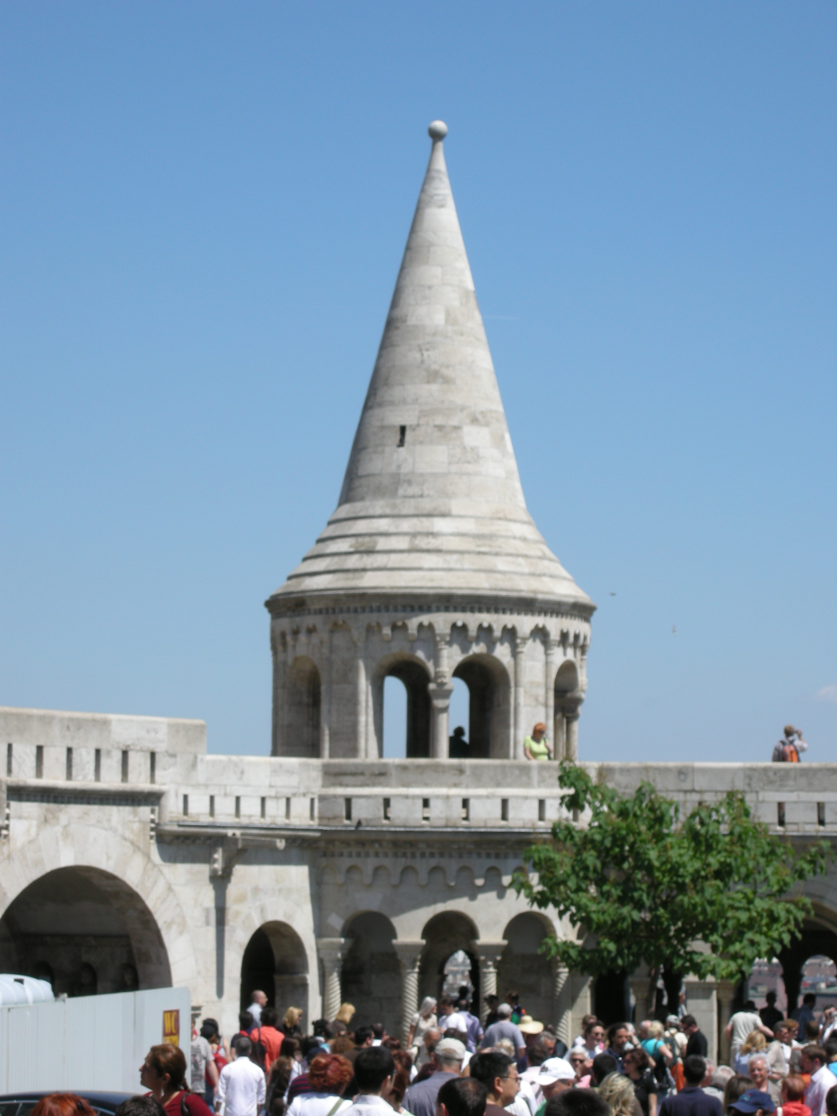 Budapest